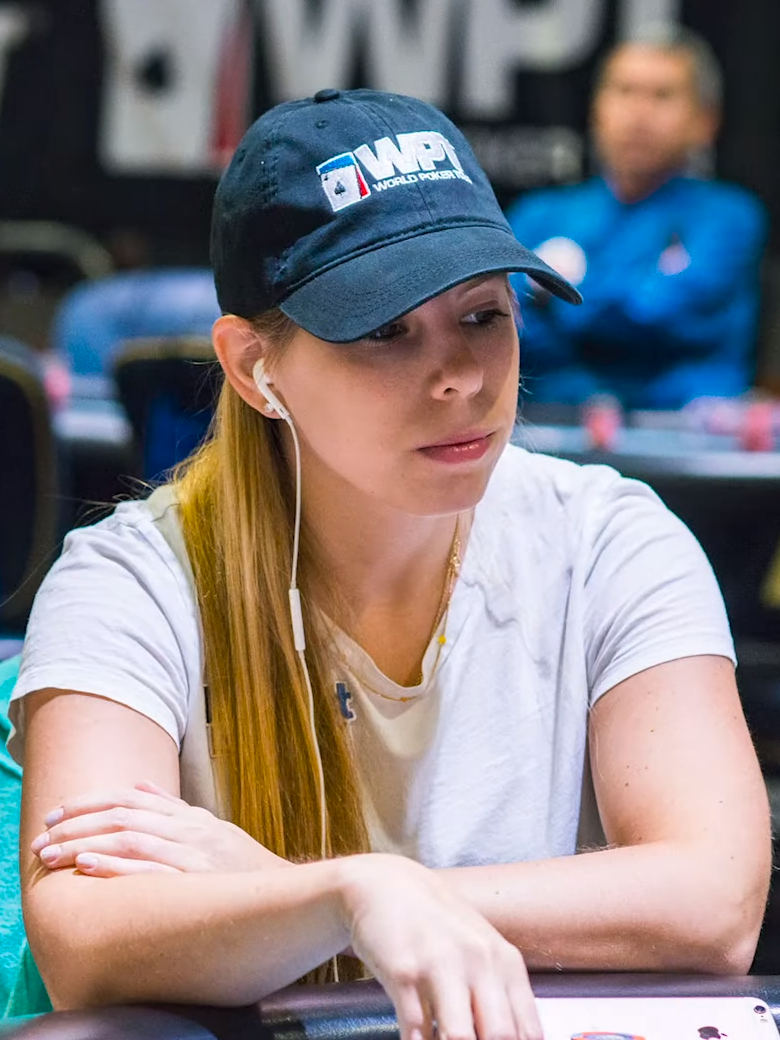 Loni Harwood beim WPT bestbet Bounty Scramble